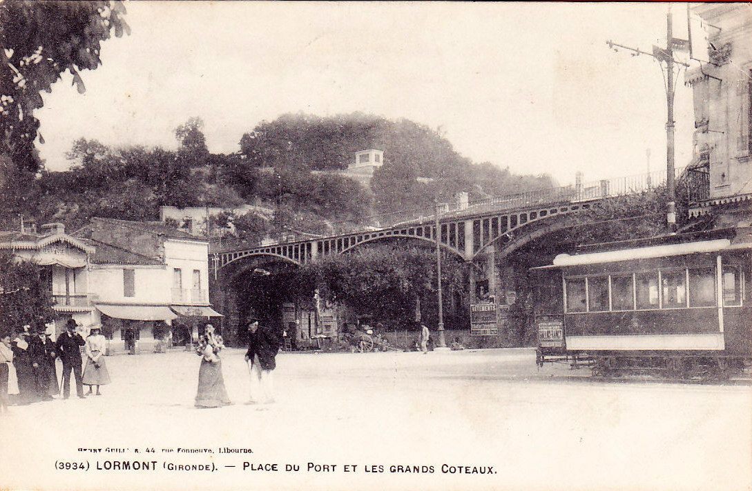 Lormont scenes